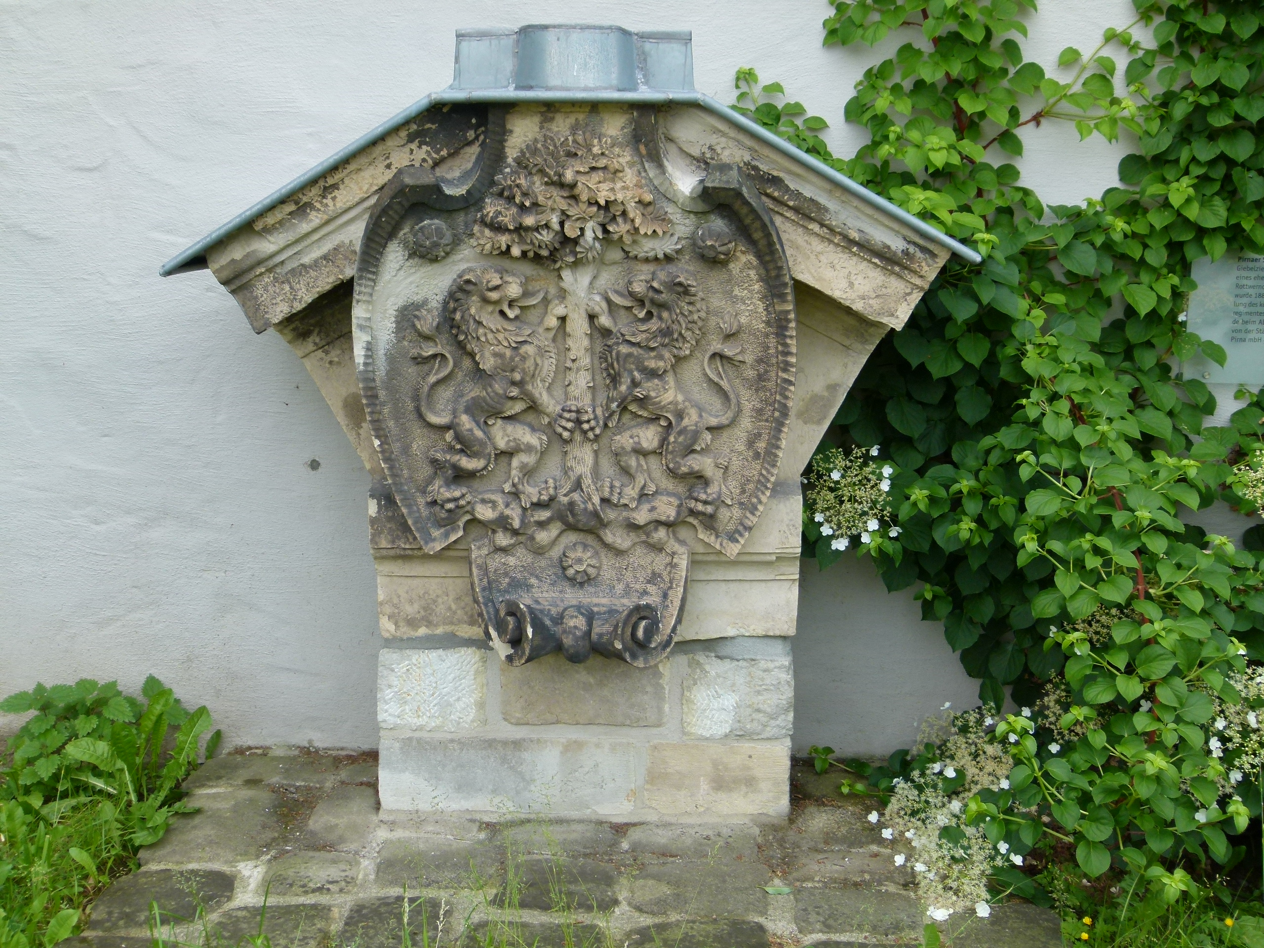 Pirnaer Stadtwappen - Giebelzier aus Sandstein vom südlichen Teil eines ehemaligen Kasernengebäudes an der Rottwerndorfer Straße in Pirna. Das Gebäude wurde 1889 errichtet. Das Wappen wurde bei Abriss des Gebäudes im Januar 2008 geborgen und an der Stadtmauer von Pirna (Am Zwinger) mit Infotafel aufgstellt.